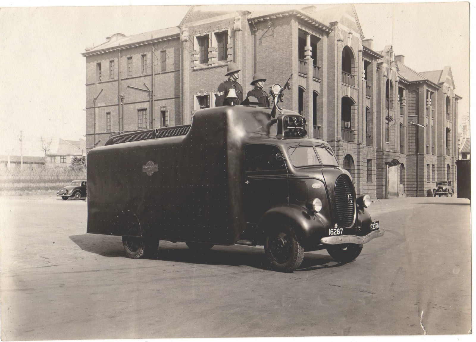 Броневик Русского полка в составе муниципальной полиции